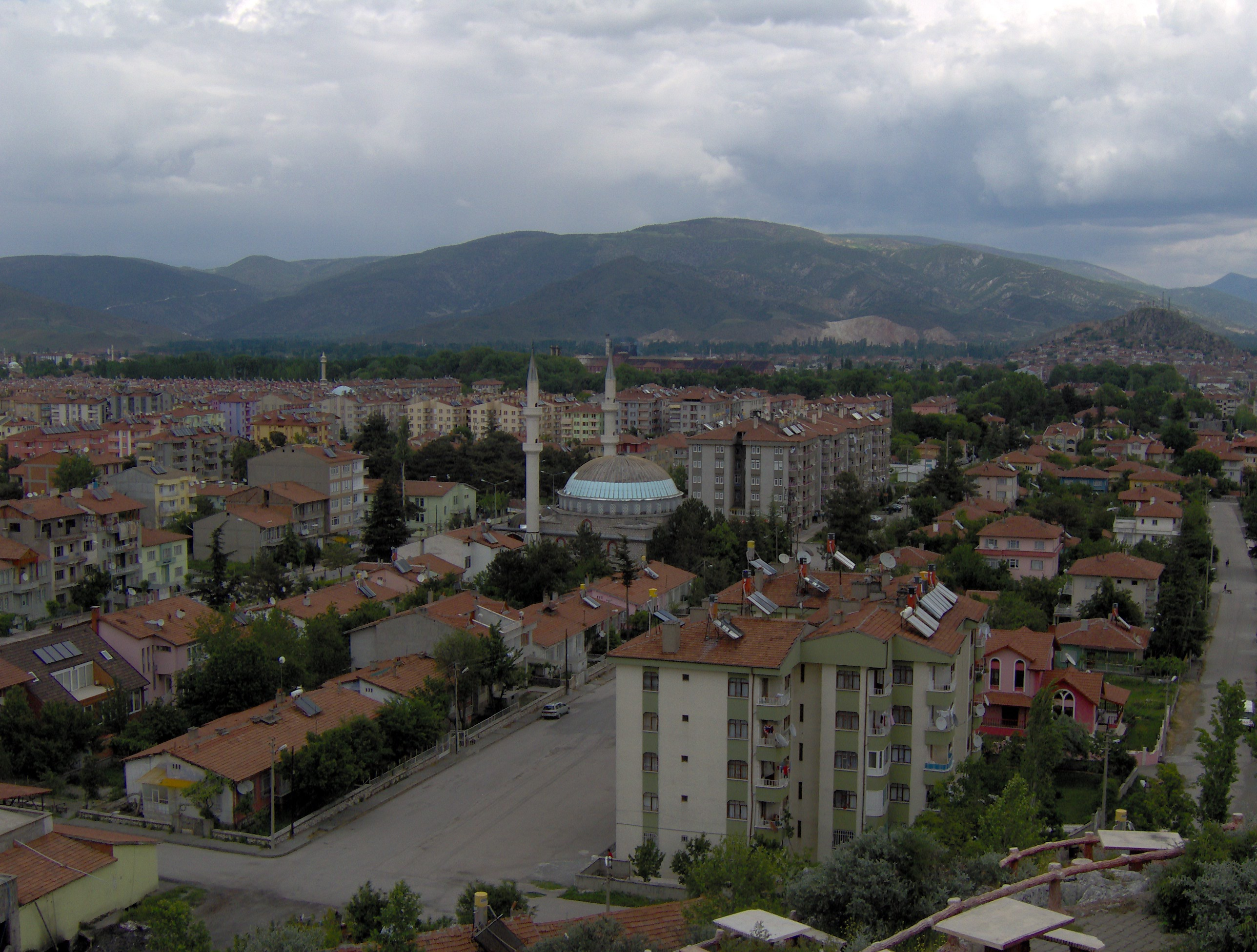 kaleden zile-2